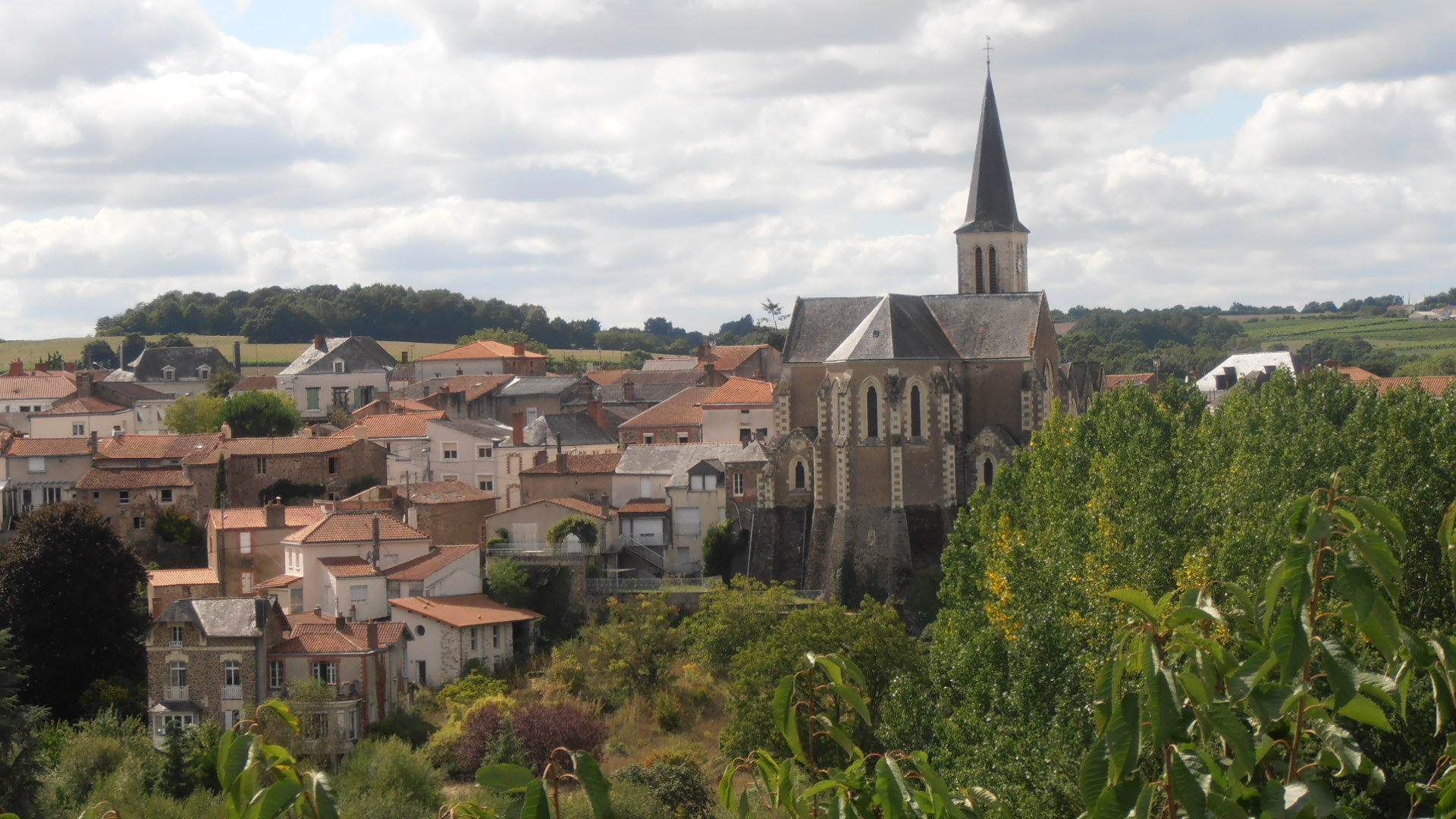 Le village de Montrevault.